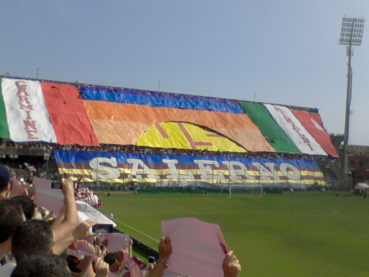 Coreografia della curva sud dello Stadio Arechi durante la finale di play-off Salernitana-Verona del 19 giugno 2011